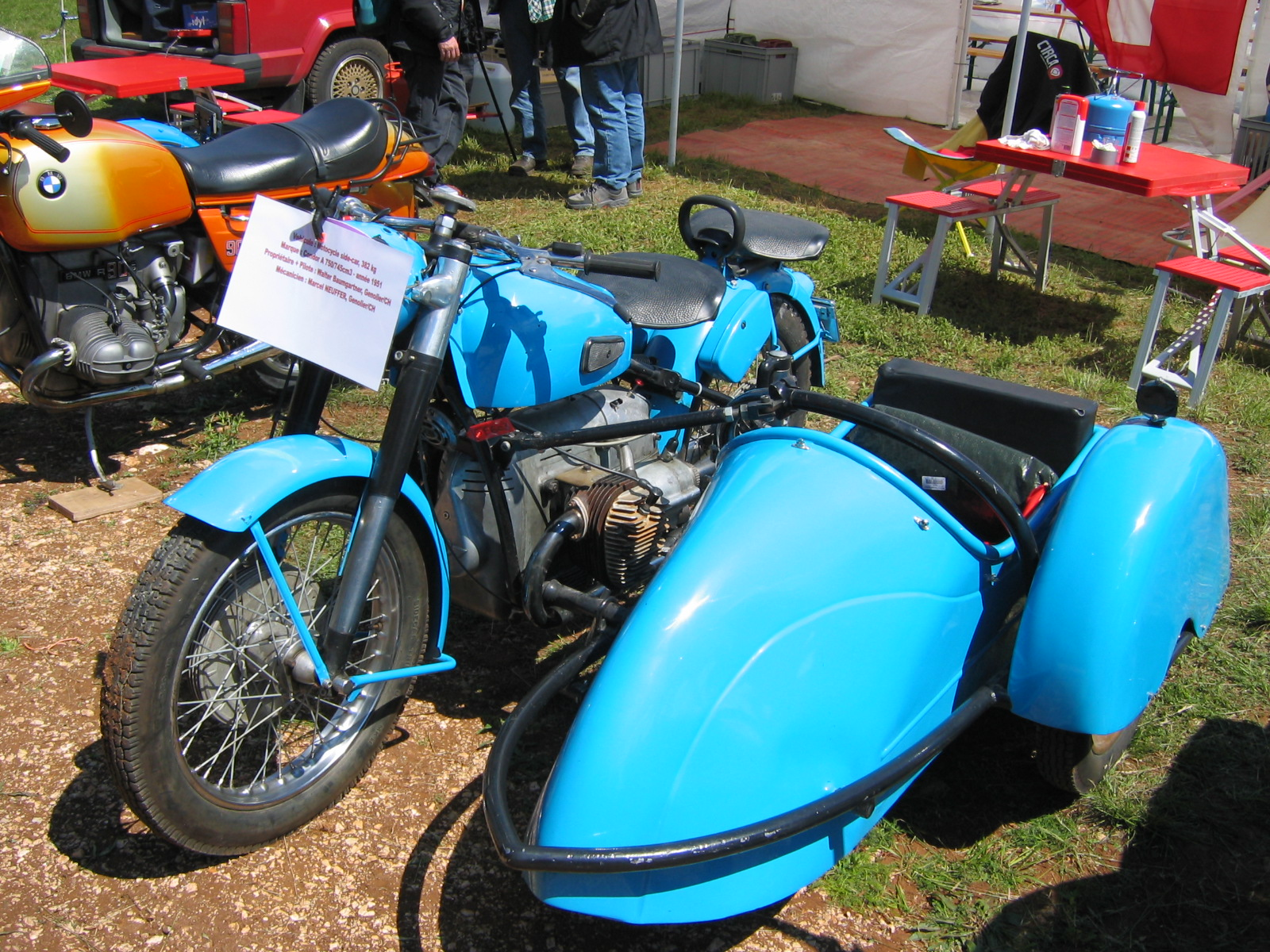 Condor Swiss side-car, 745 cc, 1951 Picture : Gérard Delafond Les Sides Condor ont été fabriqués de 1947 à 1949 particulièrement pour l'armée, ils étaient munis d'une fourche à parallélogramme, pas du tout comme la photo et la couleur est vraiment fantaisiste. Salutations Ch. Delafontaine..